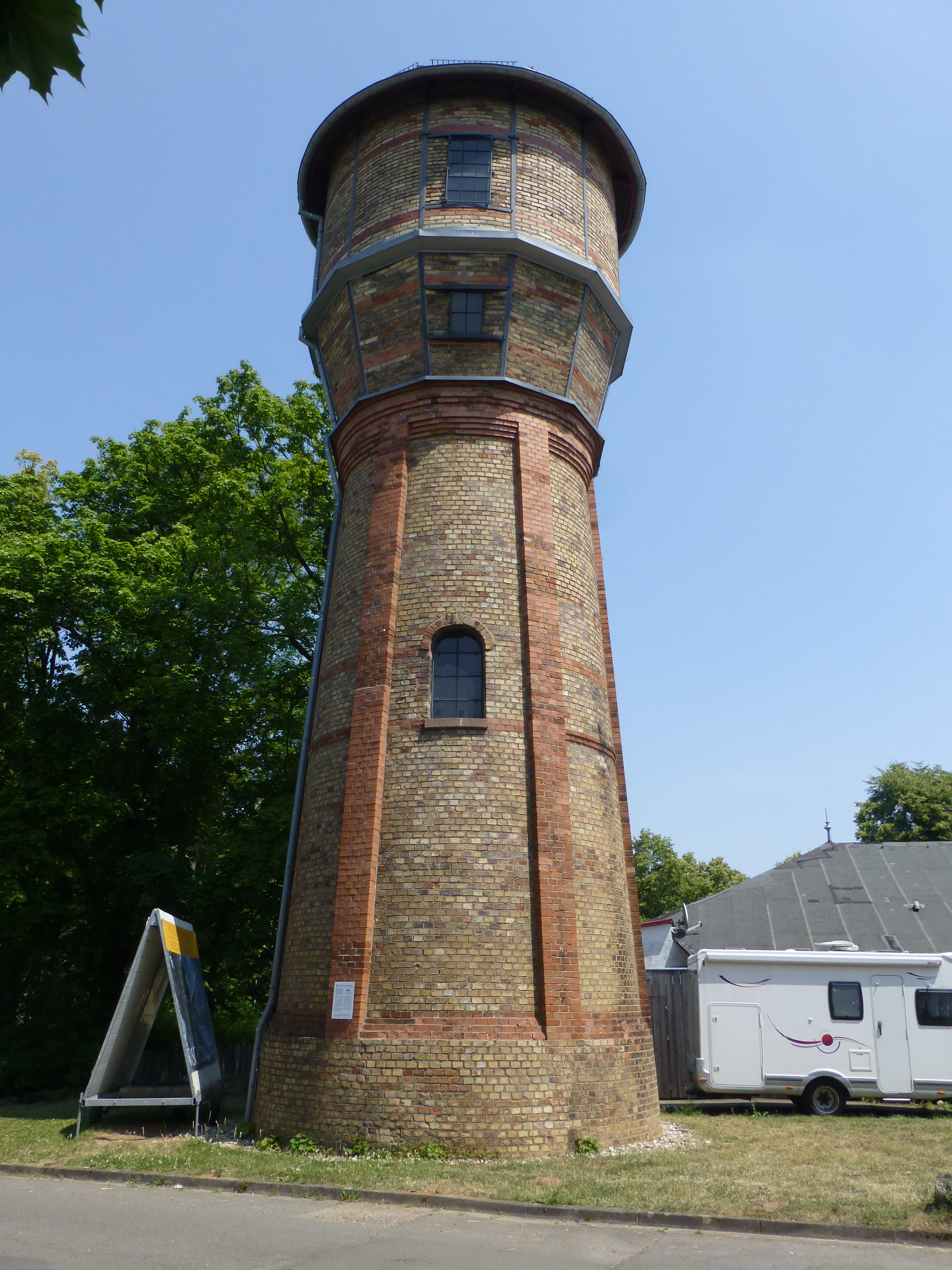 Der Wasserturm im Ortsteil Schillerhain